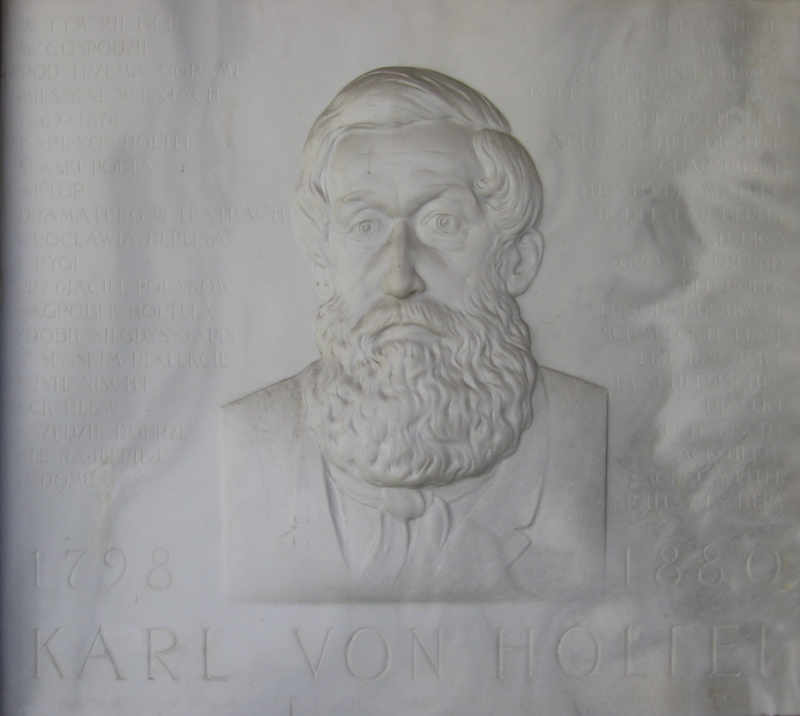 Karl von Holtei - plaque in Wrocław, Rzeźnicza street nr 32/33